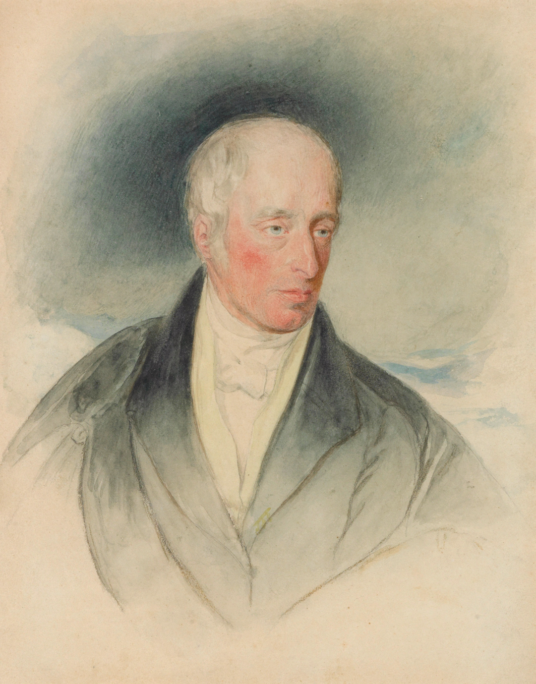 Erzherzog Rainer (1783-1853), Vizekönig der Lombardei und Venetiens, Portrait, Aquarell über Bleistiftgrundlage auf Papier, ca. 21 x 17 cm, Österreich um 1840.